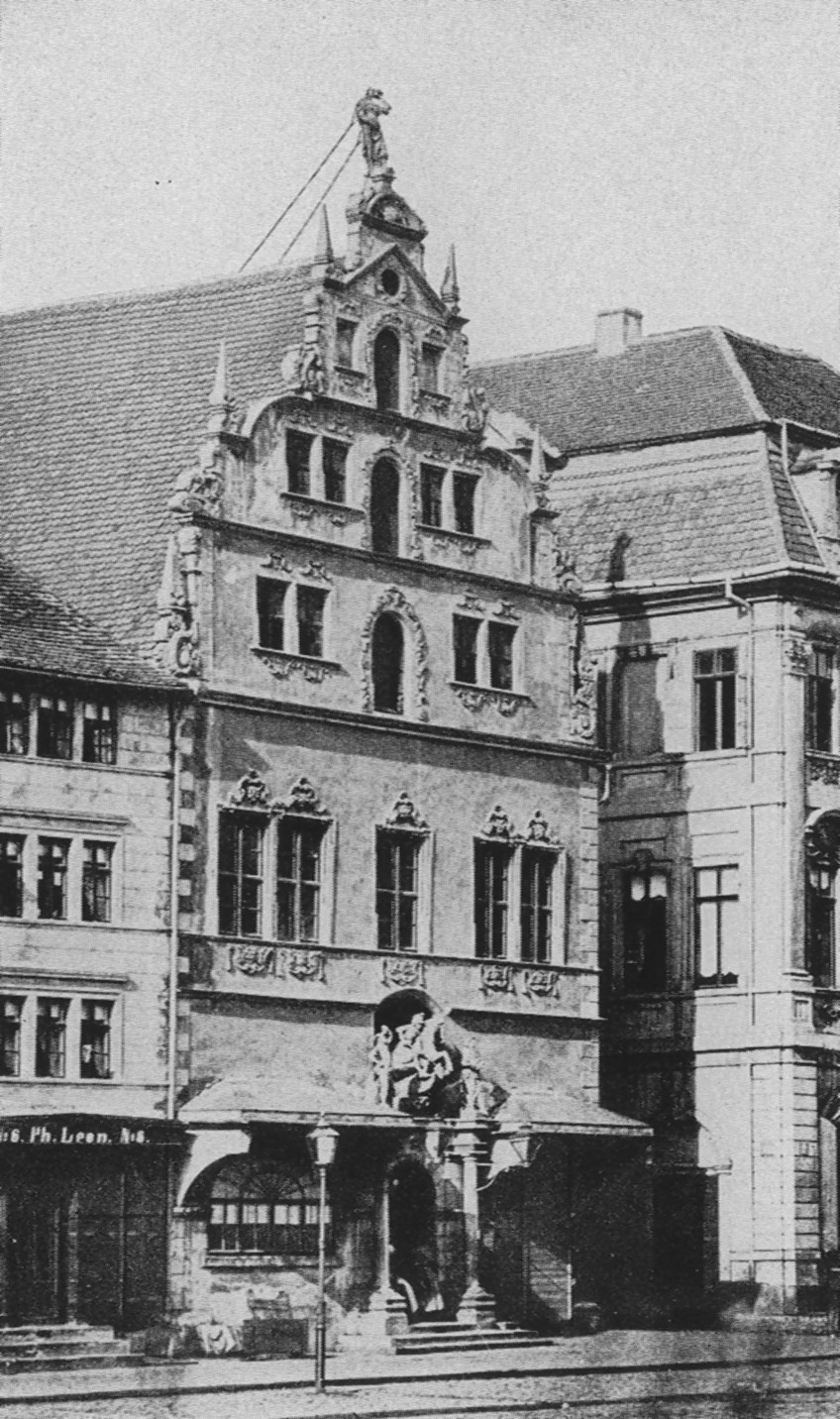 Gebäude Alter Markt Nr. 5 in Magdeburg, südliche Seite des Alten Markts, ehemaliger Sitz der Magdeburger Börse und der IHK,im 2. Weltkrieg zerstört